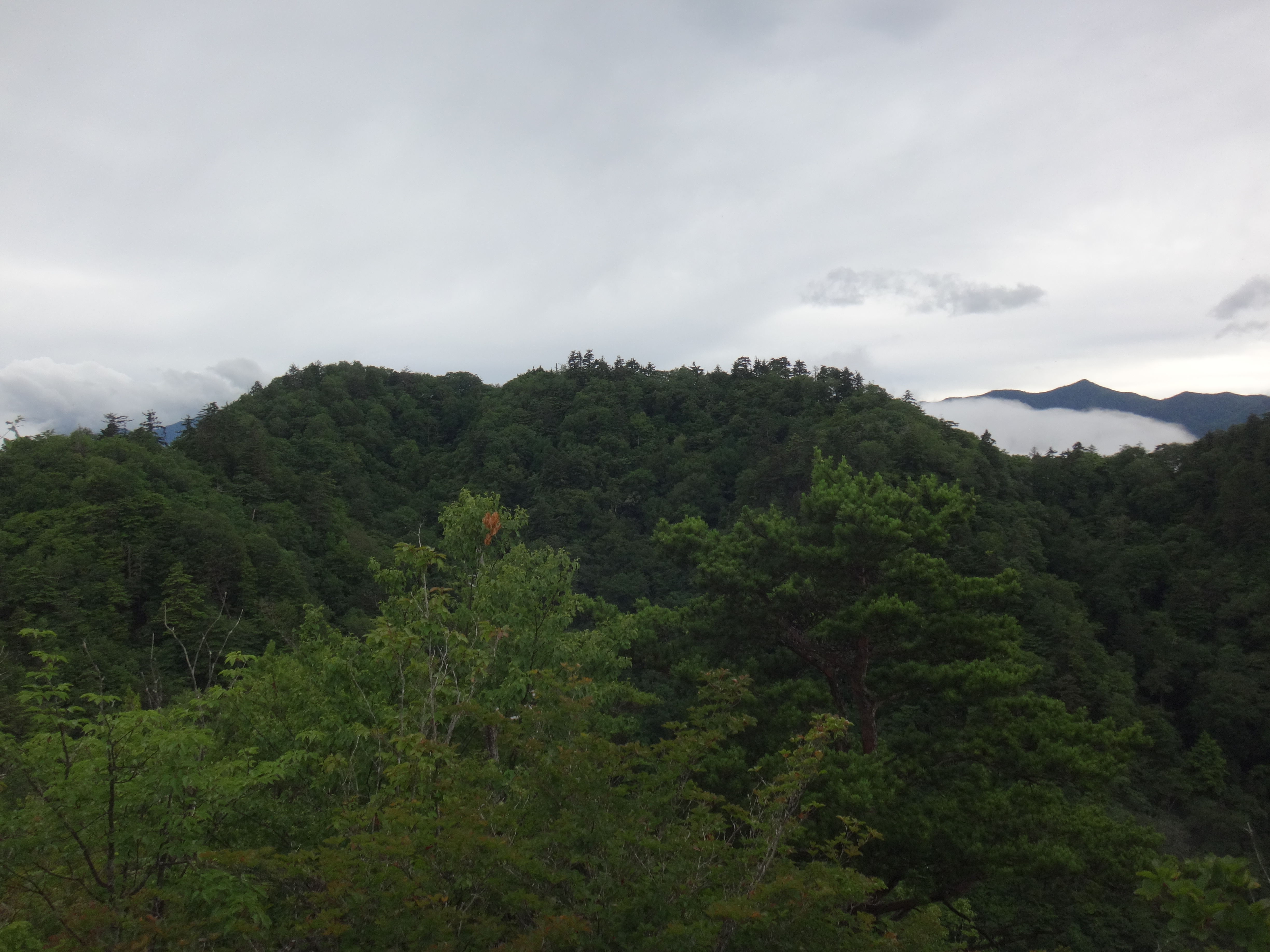 三笠山から見る諏訪山